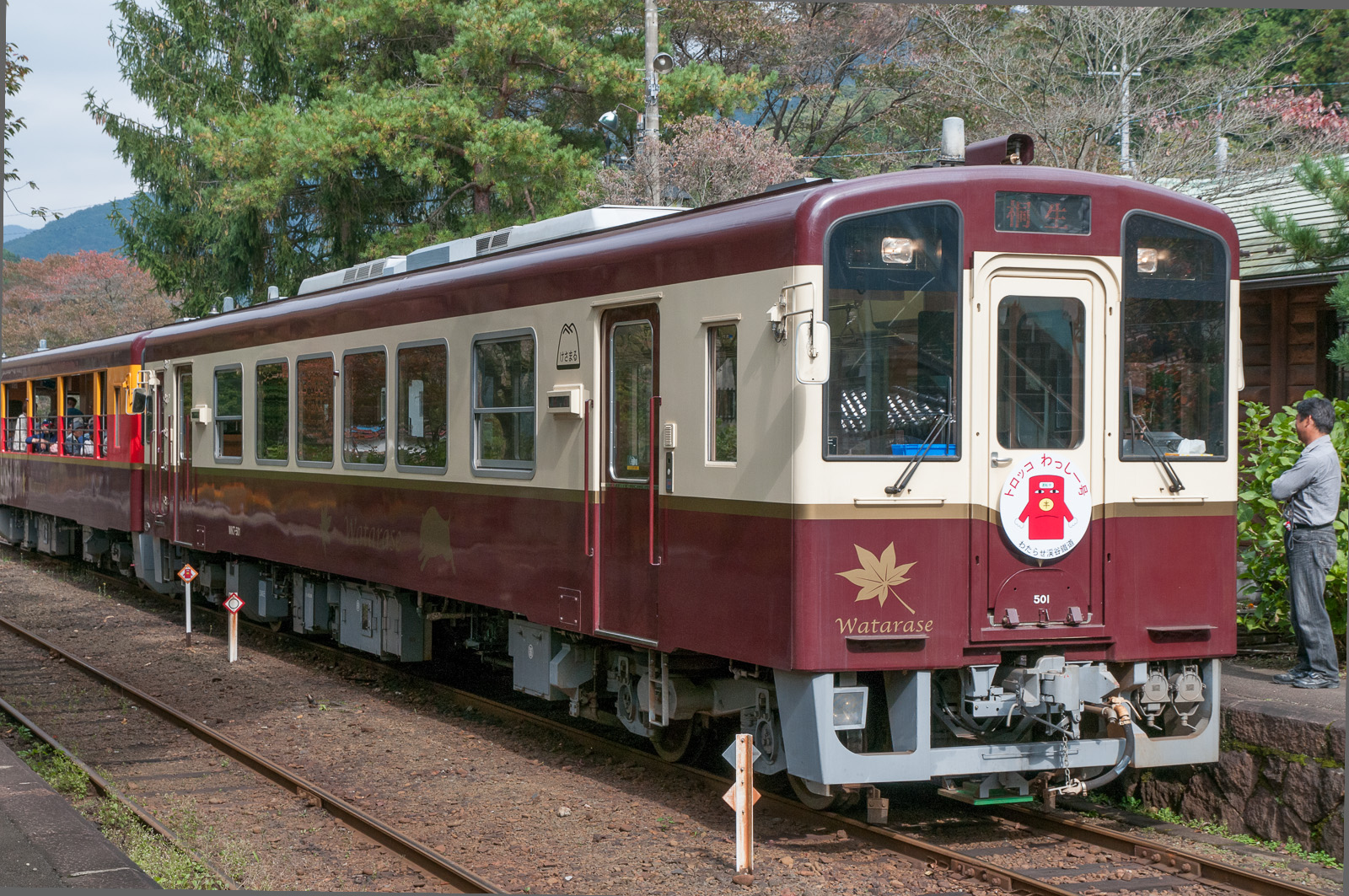 わたらせ渓谷鉄道、WKT501、沢入駅。